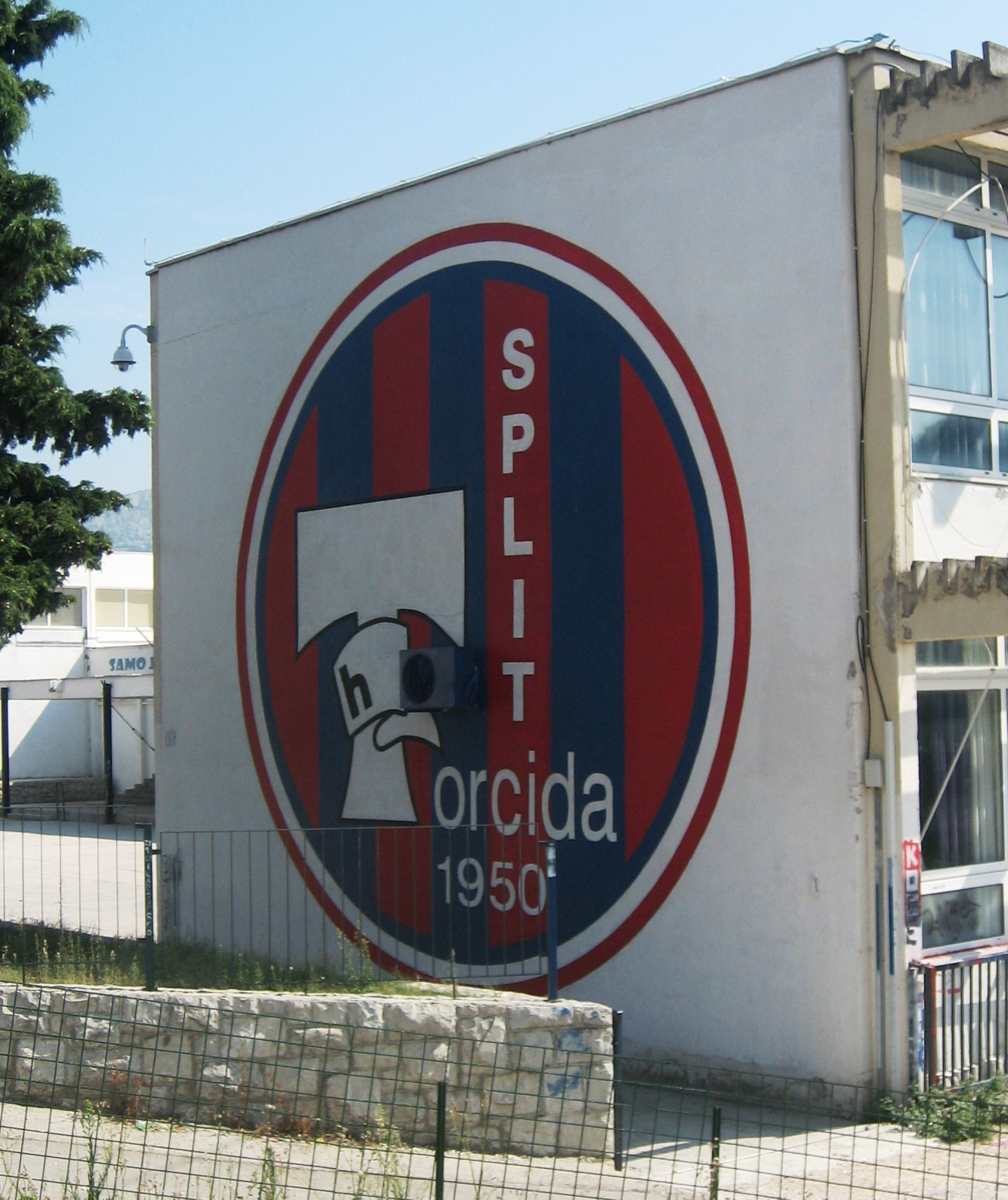 Torcidin grafit na OŠ Skalice